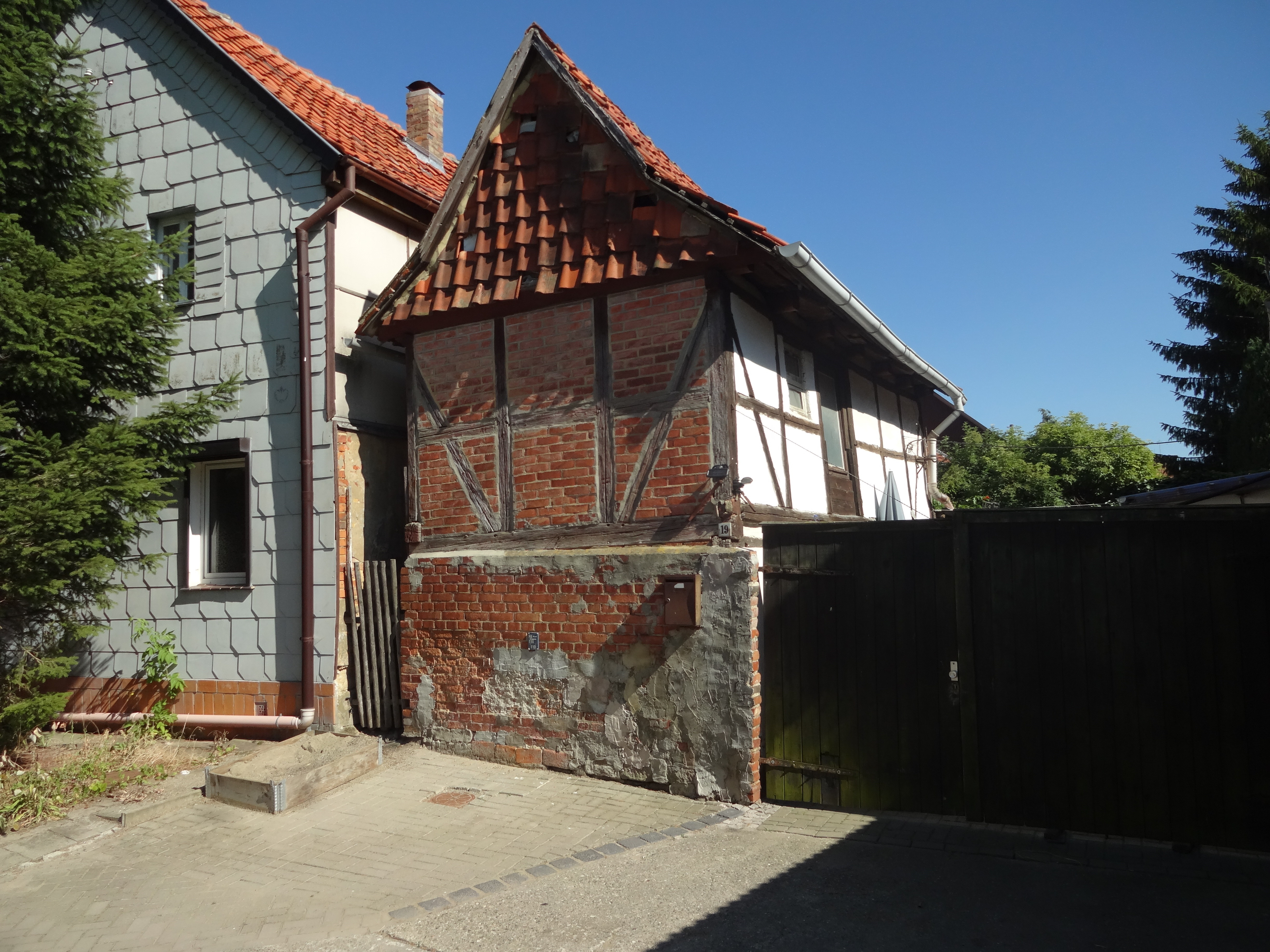 ggf. denkmalgeschützte Scheune Halberstädter Straße 19 in Harsleben